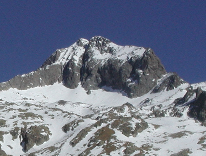 Vue sur la Cime du Gélas, en hiver, à partir du Vallon de la Madone de Fenestre. Photo personnelle